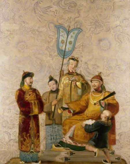 Robert Jones 於1817~1822所繪的仿中國裝飾畫。1802年當時的攝政王收到一些來自中國的壁紙，此作品是受到中國壁紙影響而創作的，存於1832年建成的英國南部布萊頓（Brighton）的皇家穹頂宮(Royal Pavilion)。